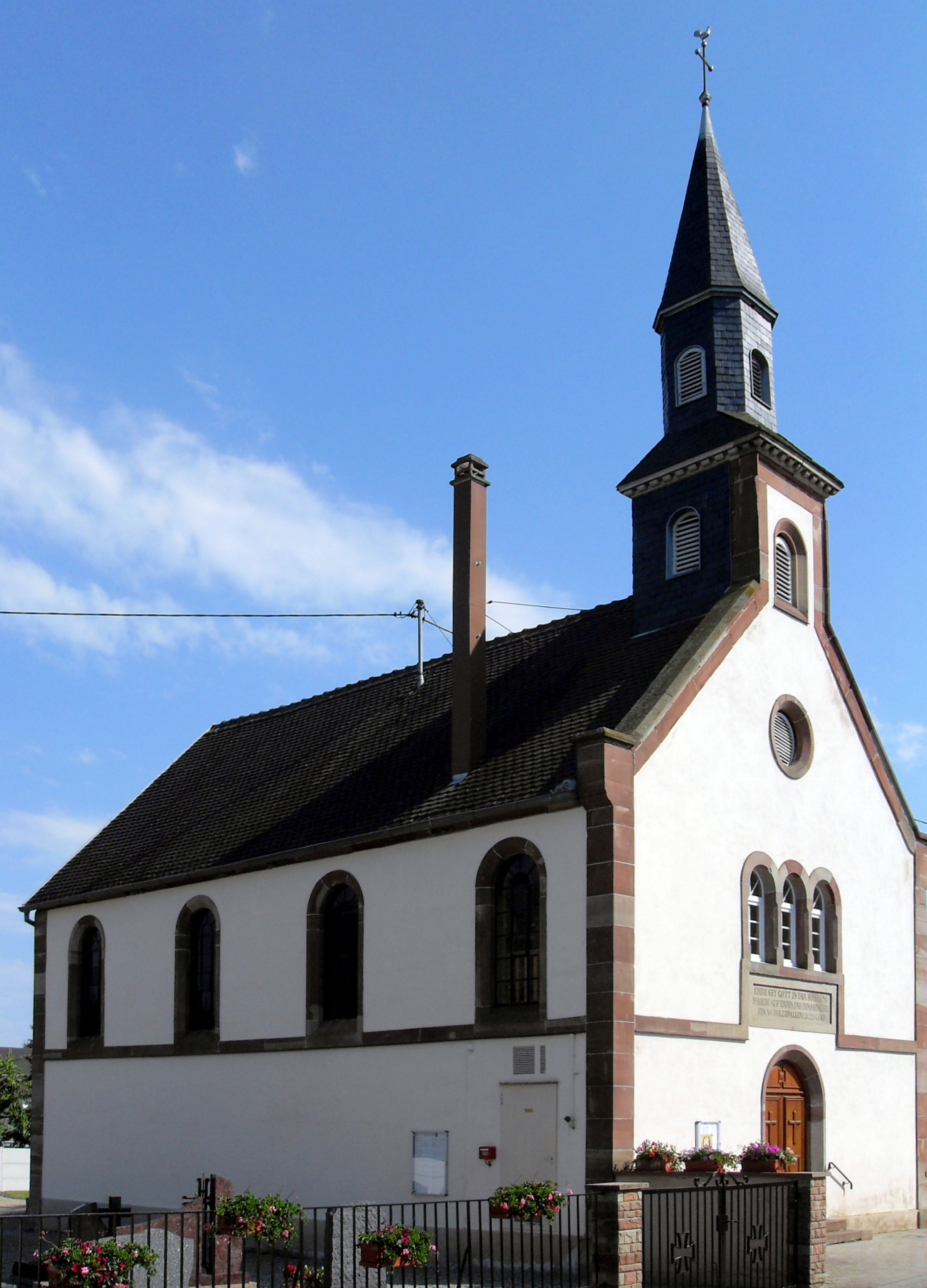 Le temple luthérien à Daubensand